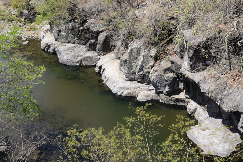 Rio en San Antonio, Achuapa, Nicaragua